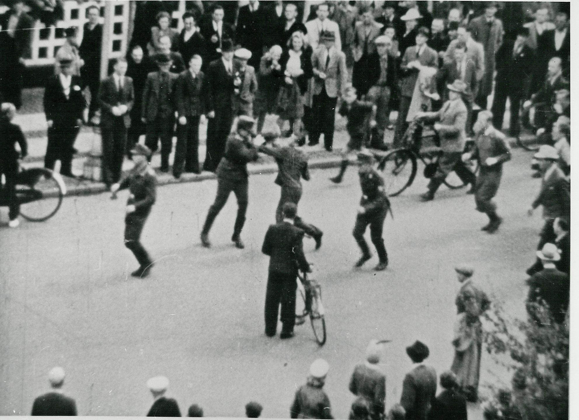 Augustoprøret. Tyske soldater i konflikt med befolkningen Sted: Aalborg Dato: August 1943 Se flere billeder her: Rights: More about The Museum of Danish Resistance (Frihedsmuseet)